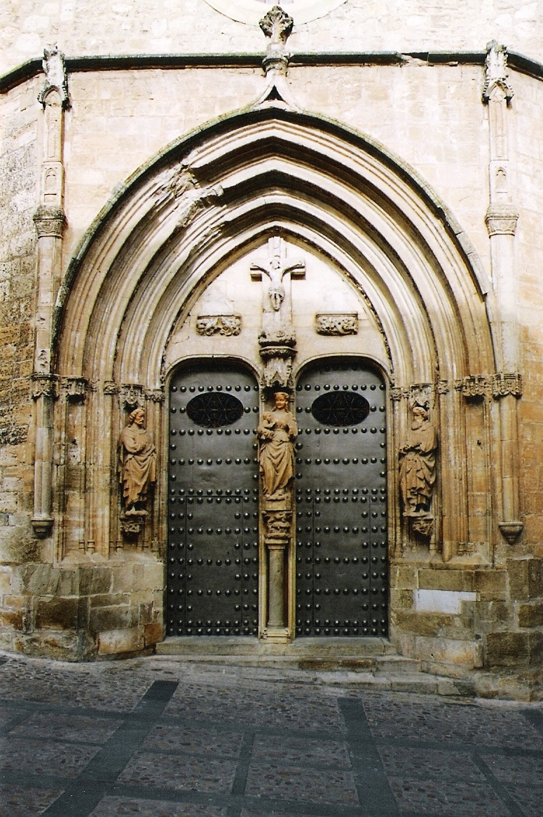 Portada de la iglesia de Chinchilla